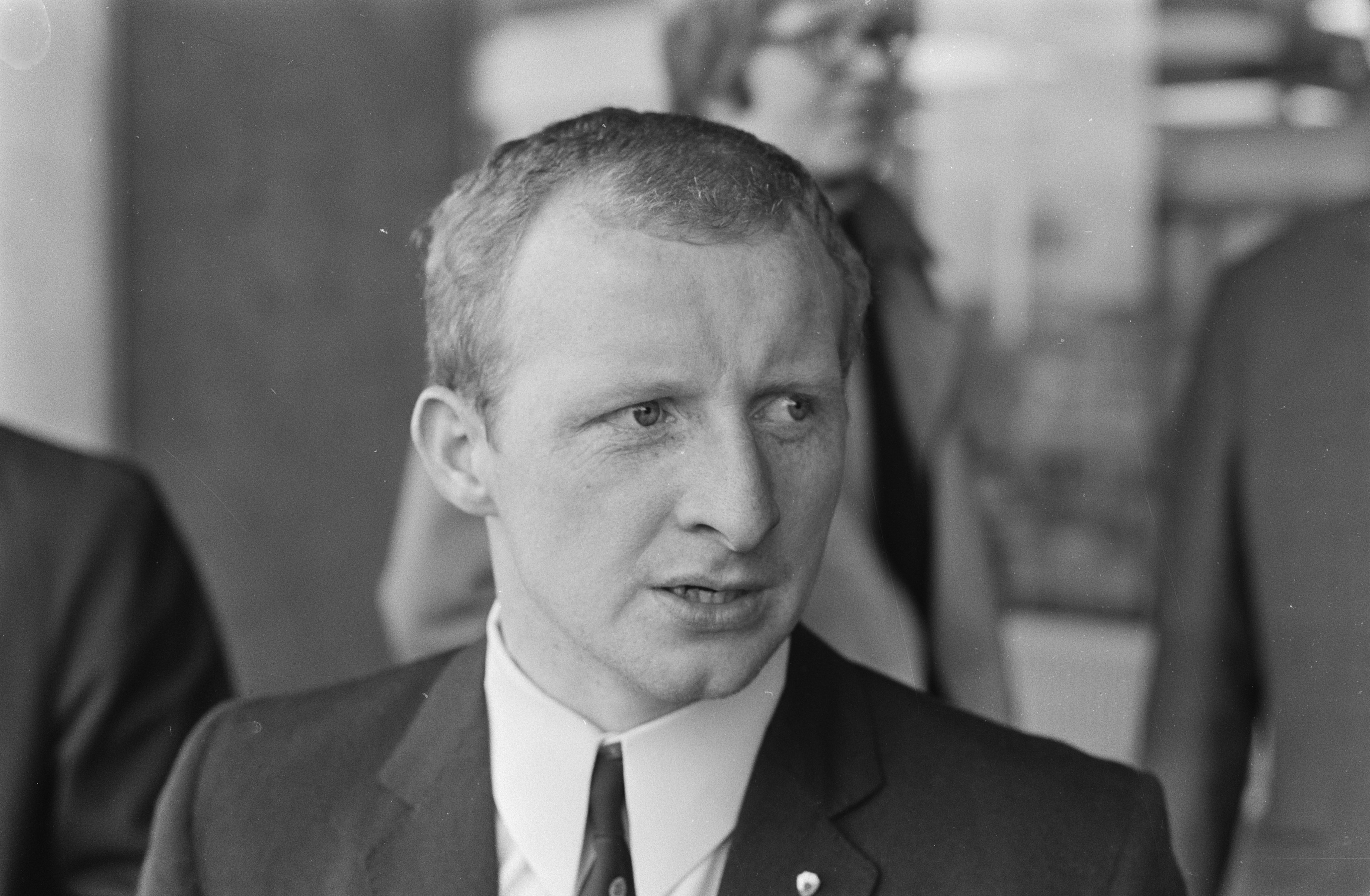 Jimmy Johnstone als speler van Celtic in Amsterdam